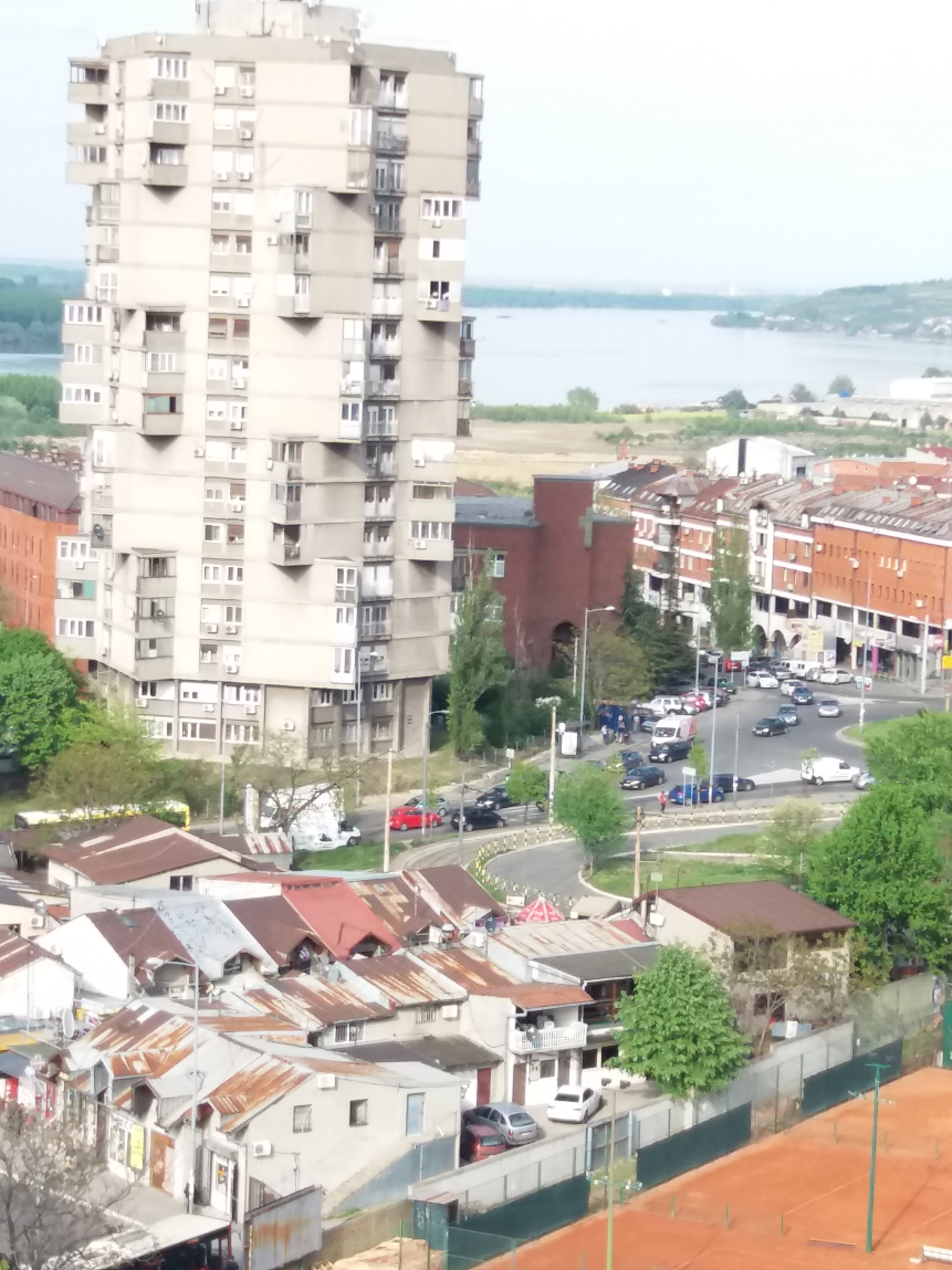 Srpski (latinica): Karaburma